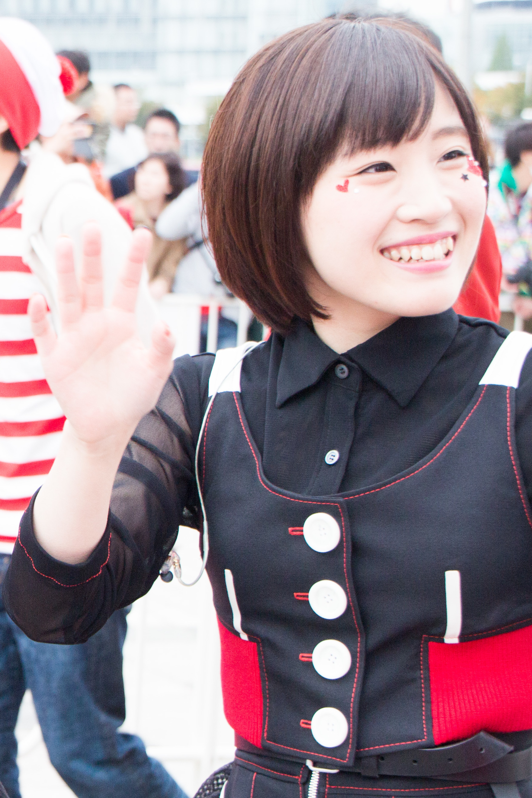 T-SPOOK 2016 小清水亜美 西田望見 鈴木みのり (ワルキューレ)